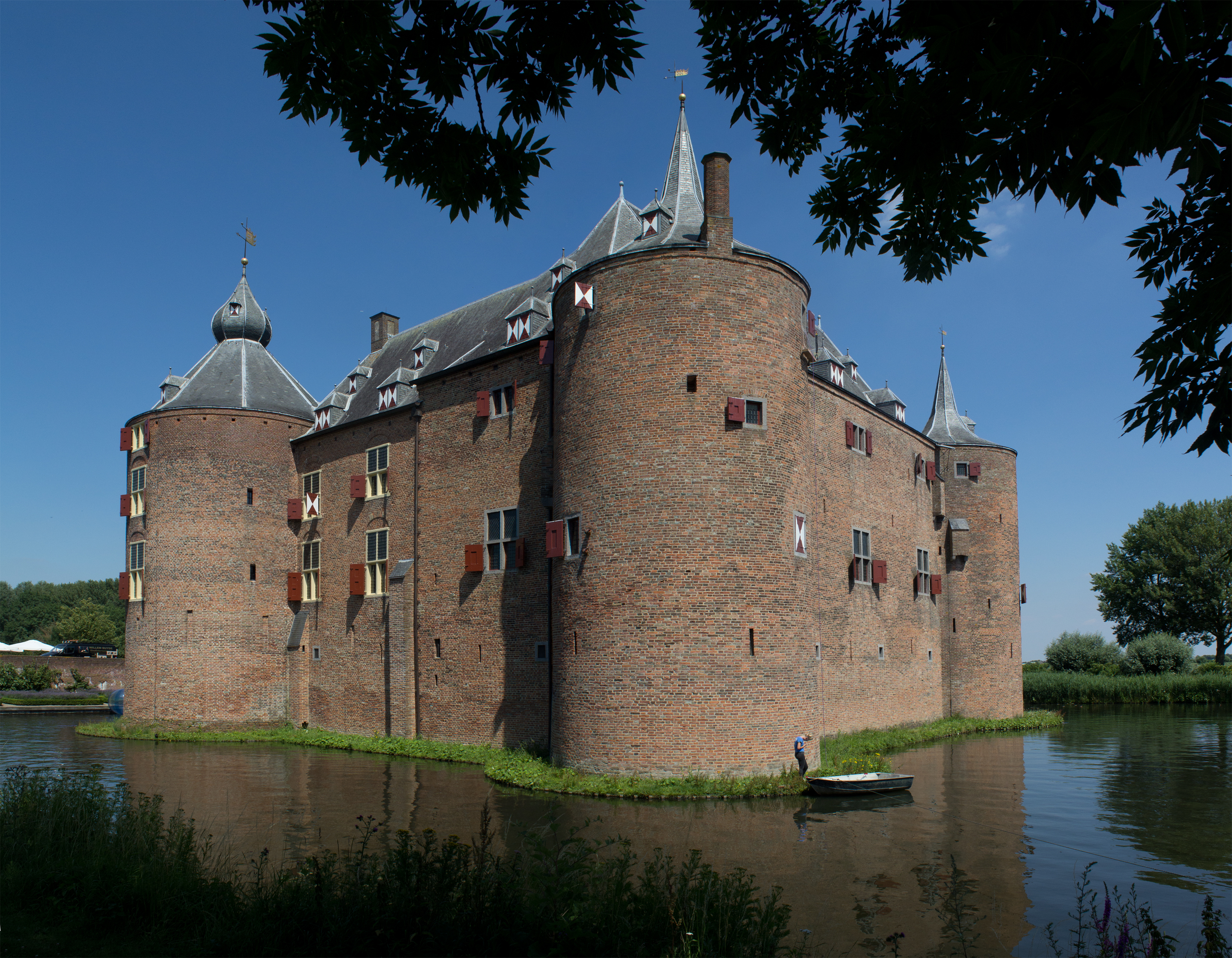 Kasteel Ammersoyen - Hoofdburcht